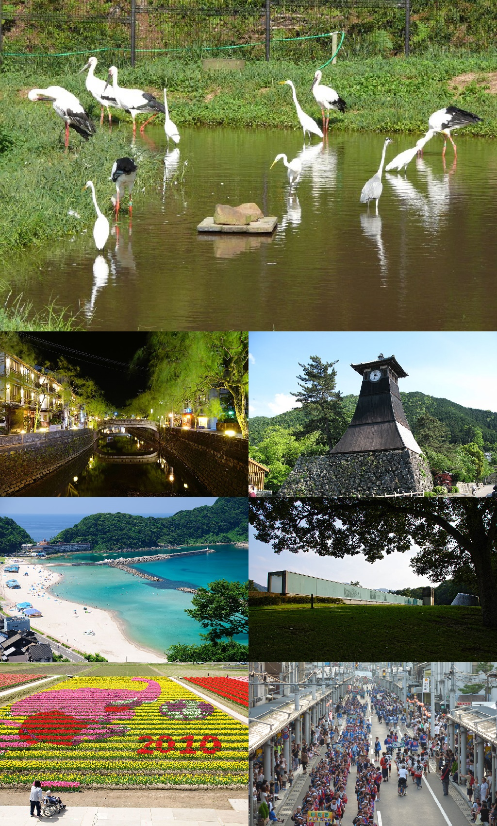 兵庫県豊岡市のモンタージュ。